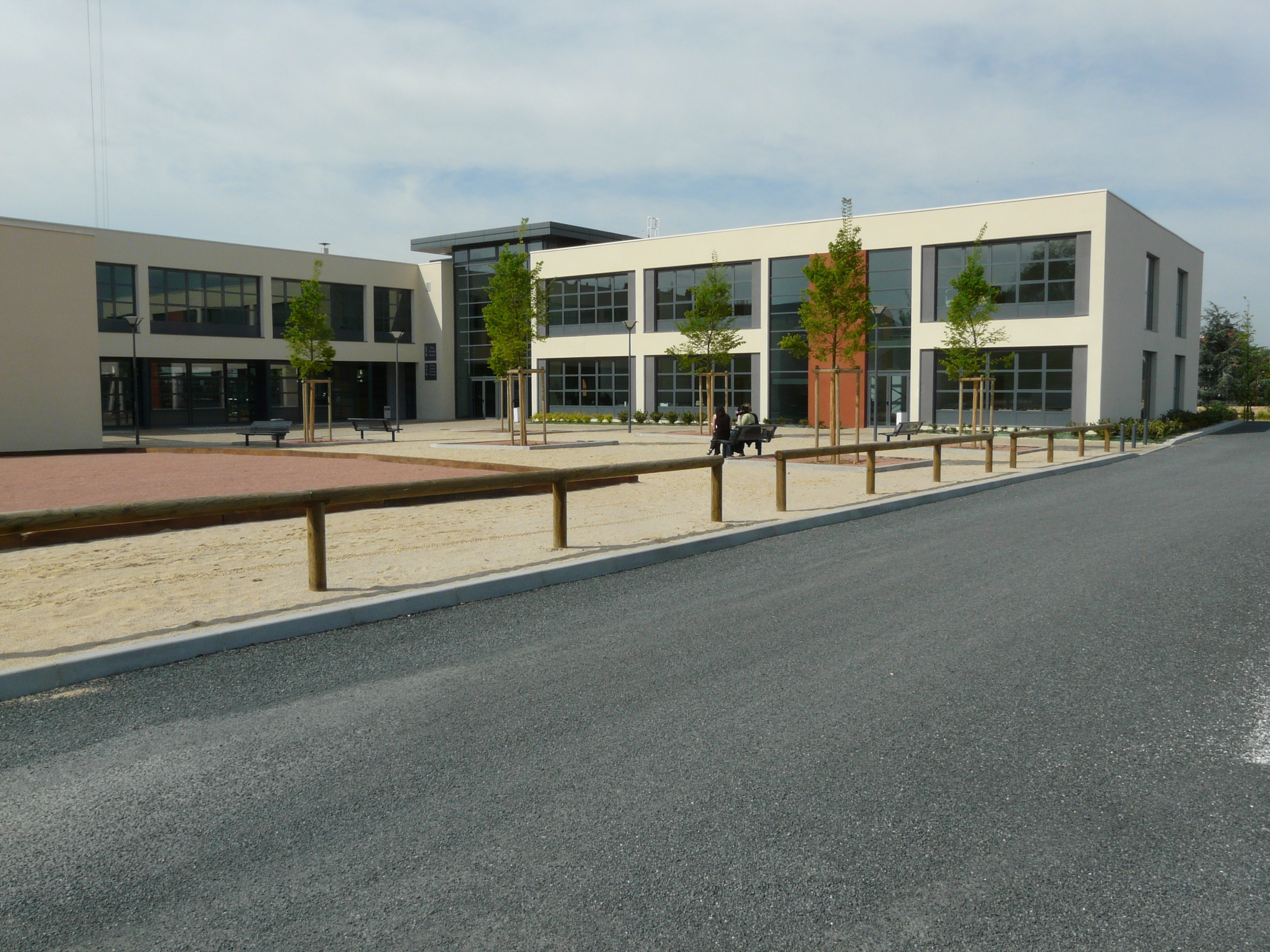 université